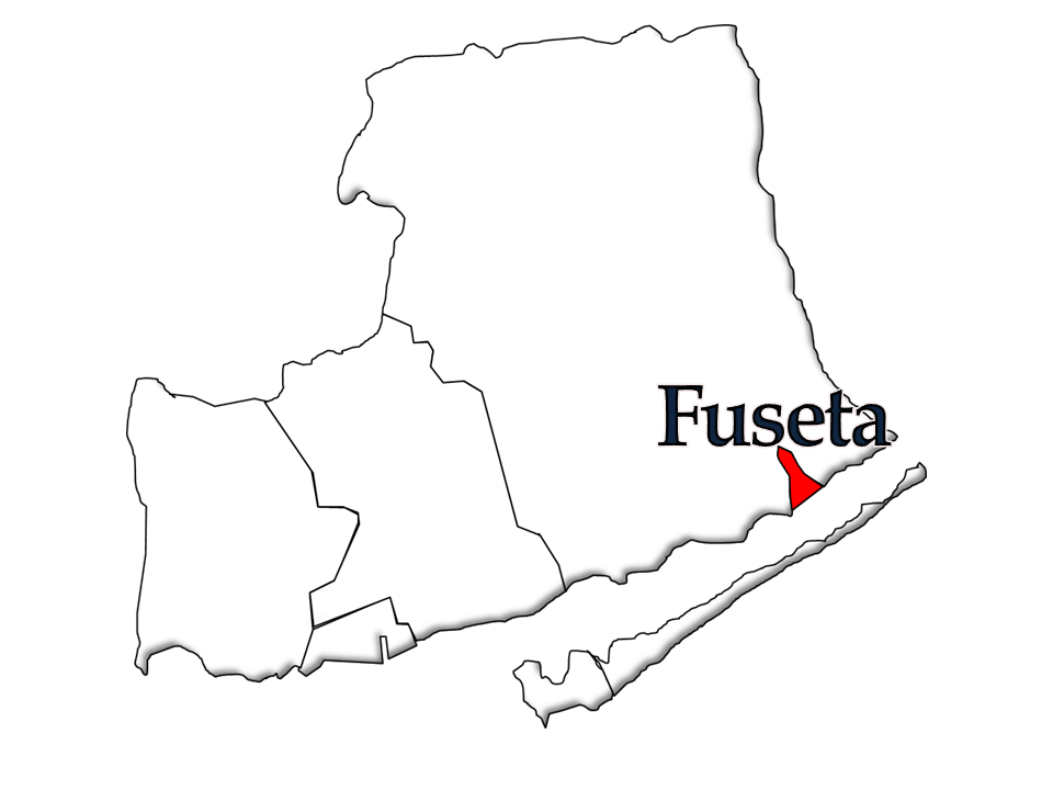 Cenos 1864/2011